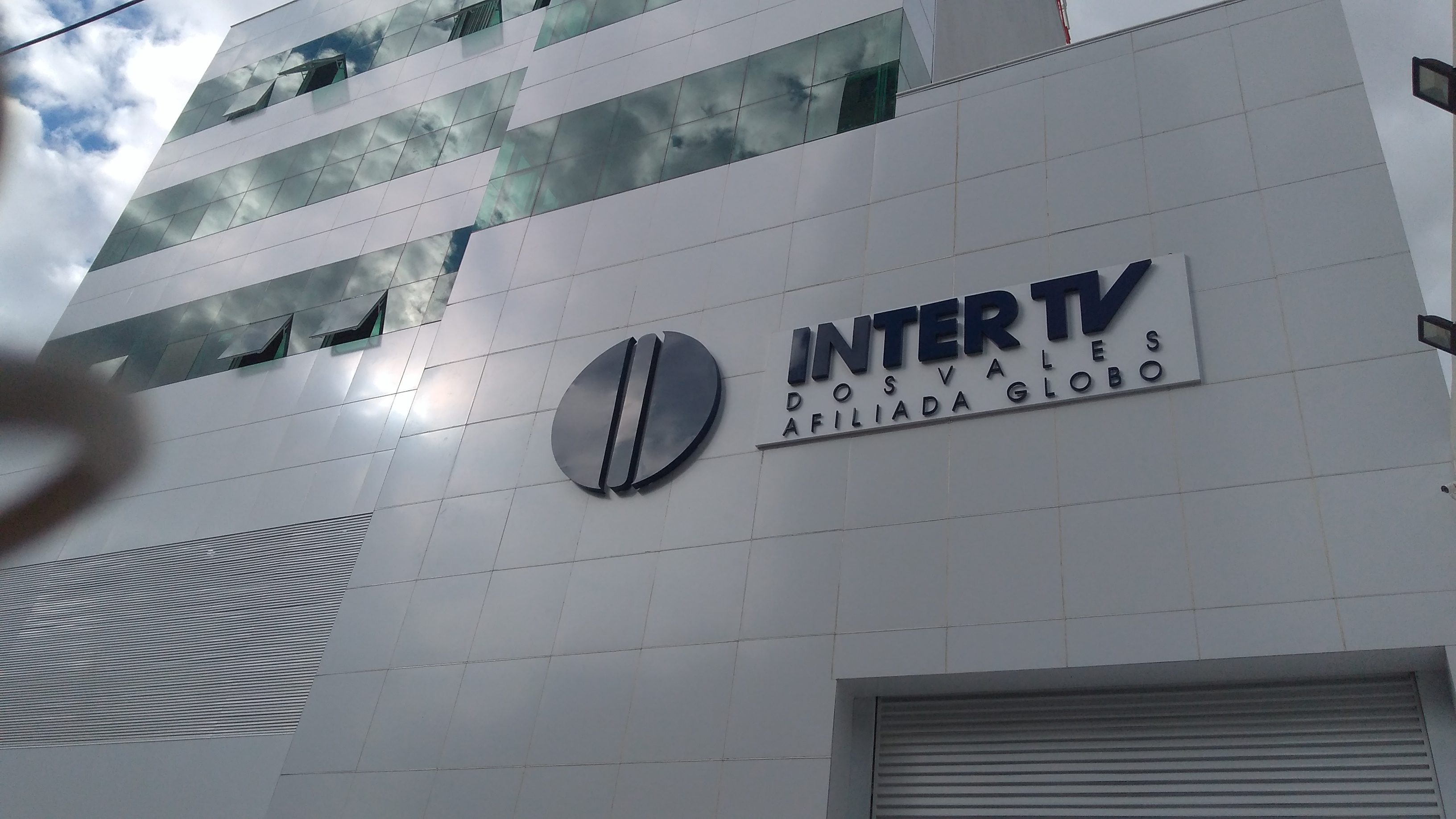 Edifício Sede da Inter TV dos Vales, afiliada Rede Globo em Governador Valadares, MG.